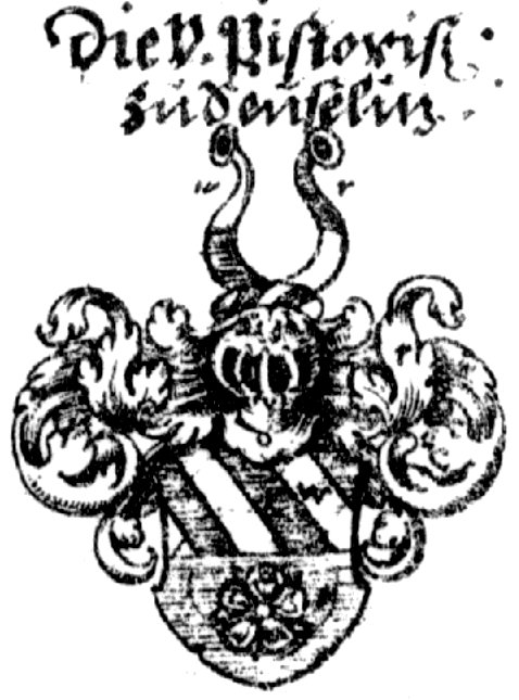 Wappen derer von Pistoris